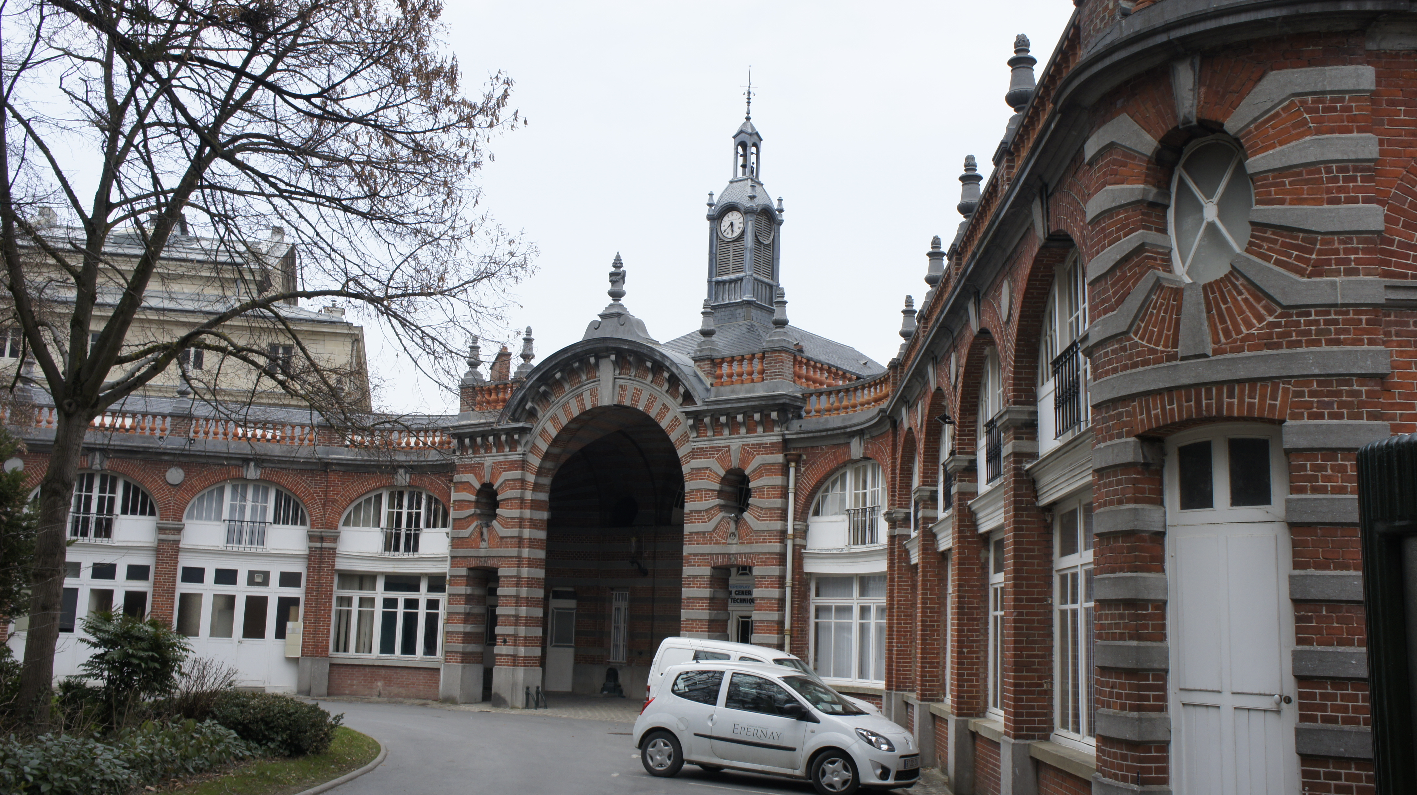 vue des communs de l'Hôtel Auban-Moët.